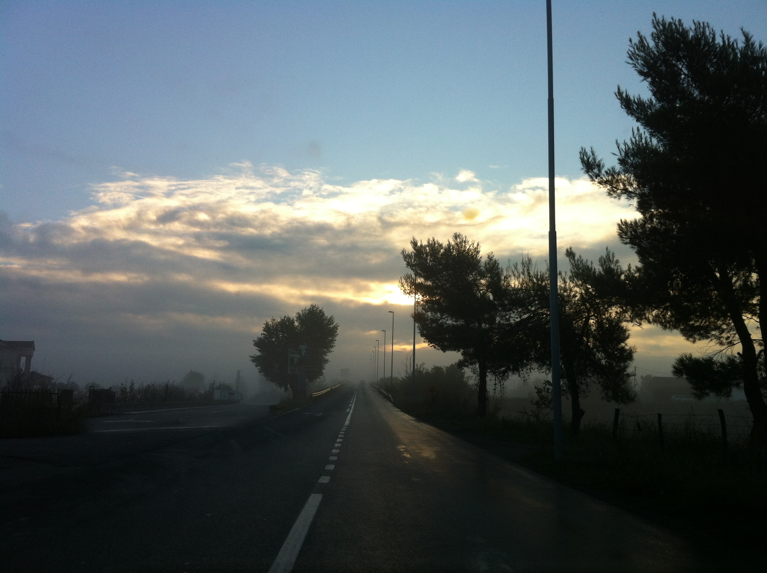 Mojanovići, Montenegro